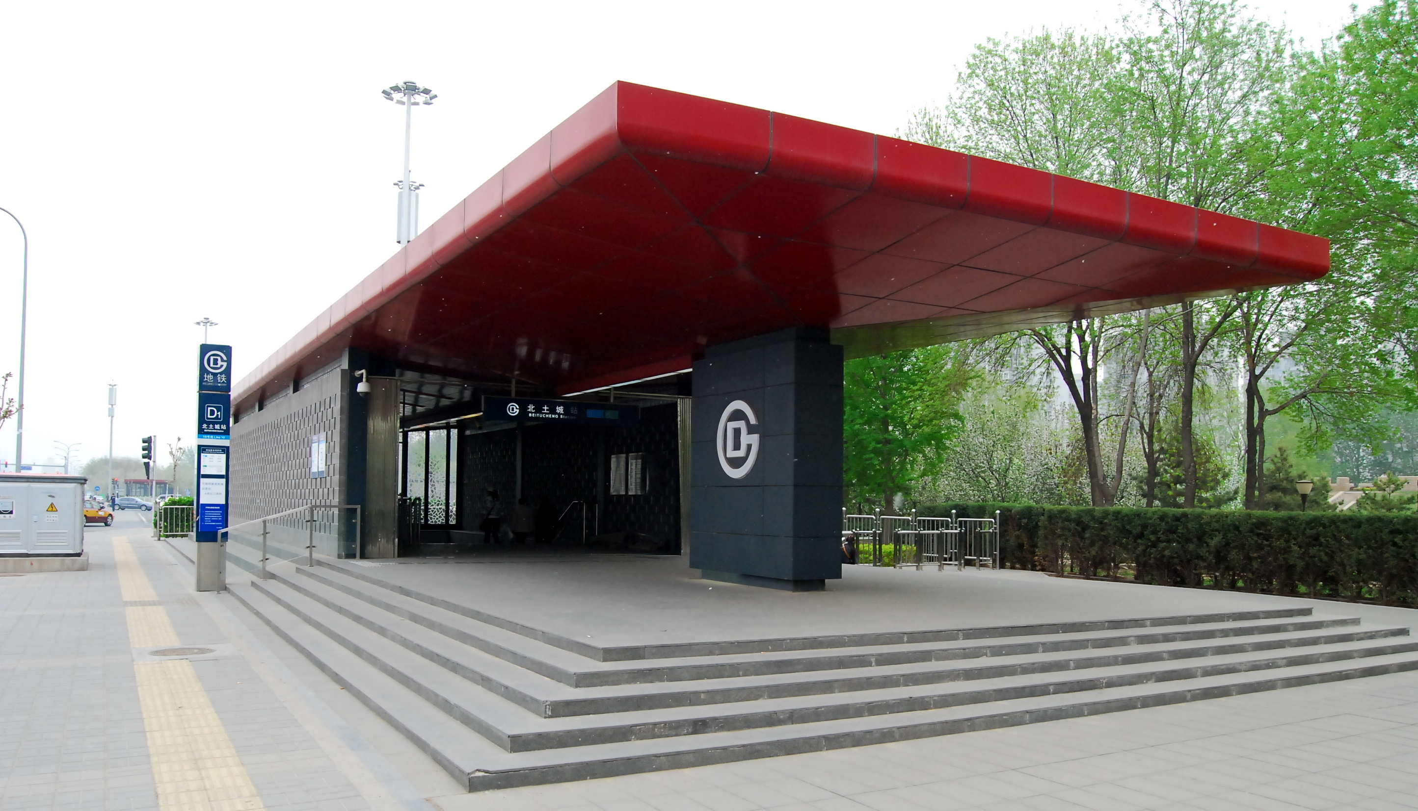 北京地铁北土城地铁站D1出口